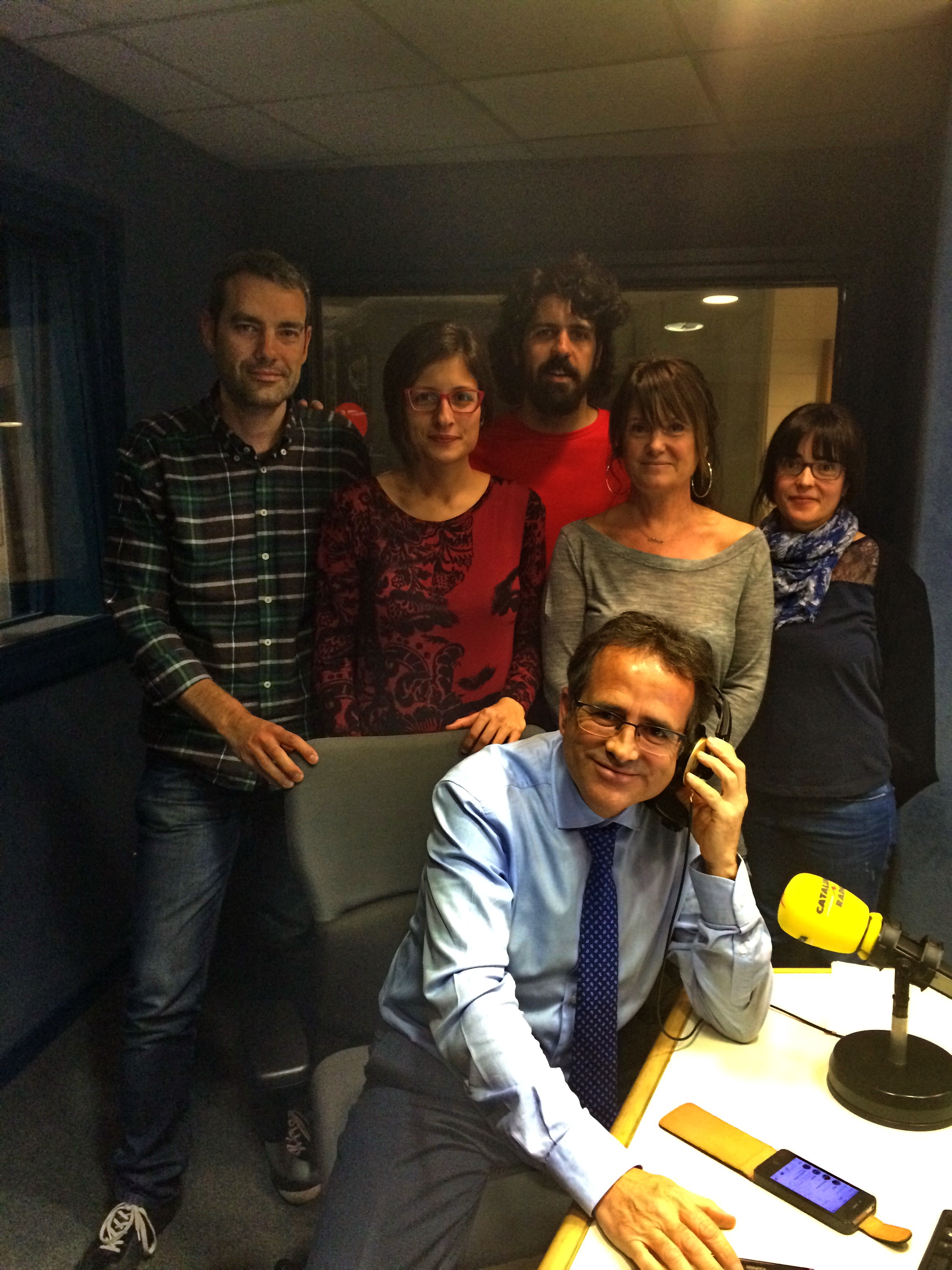 Equip de Catalunya Vespre, programa de Catalunya Ràdio